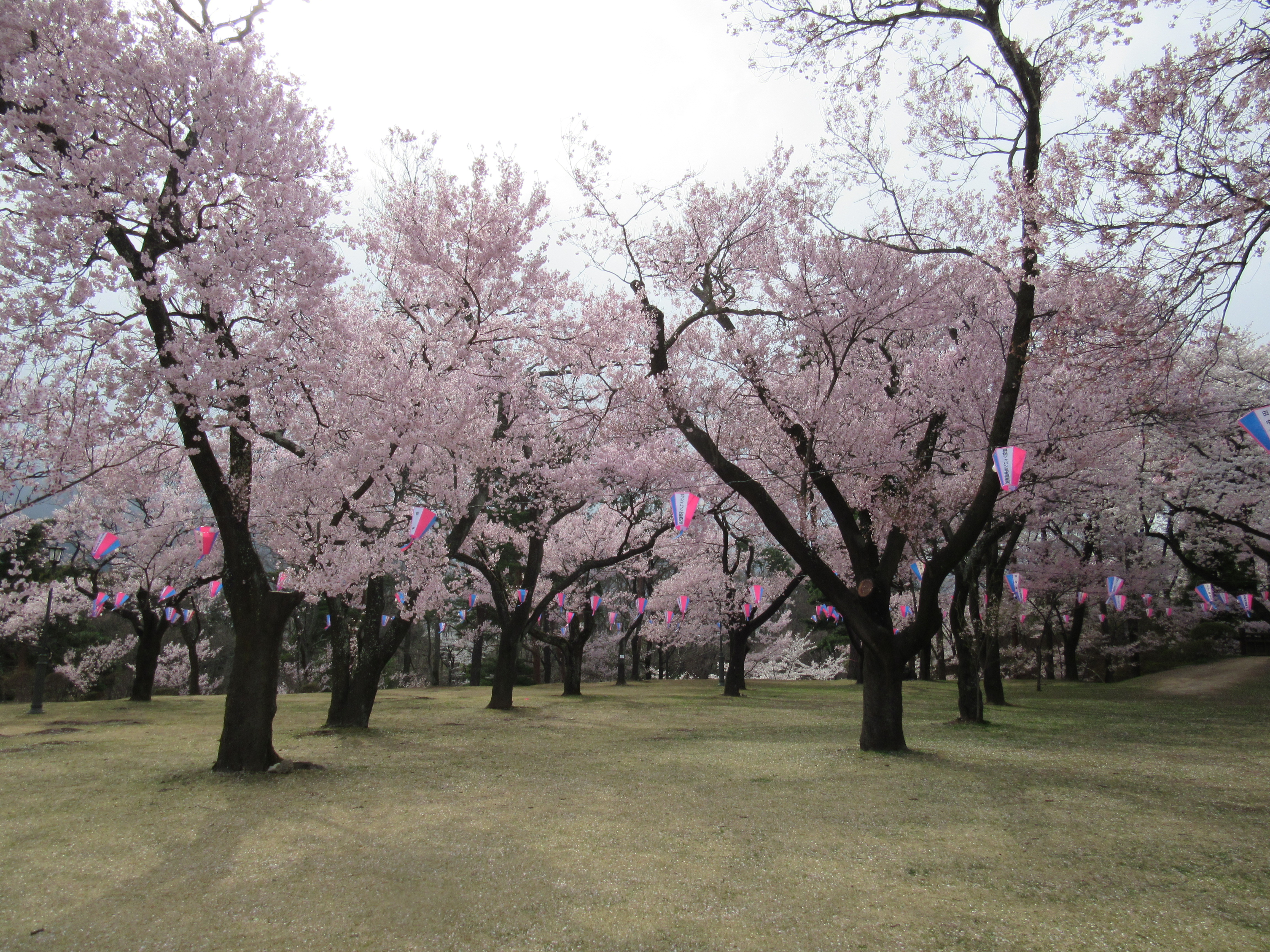 春日城址公園